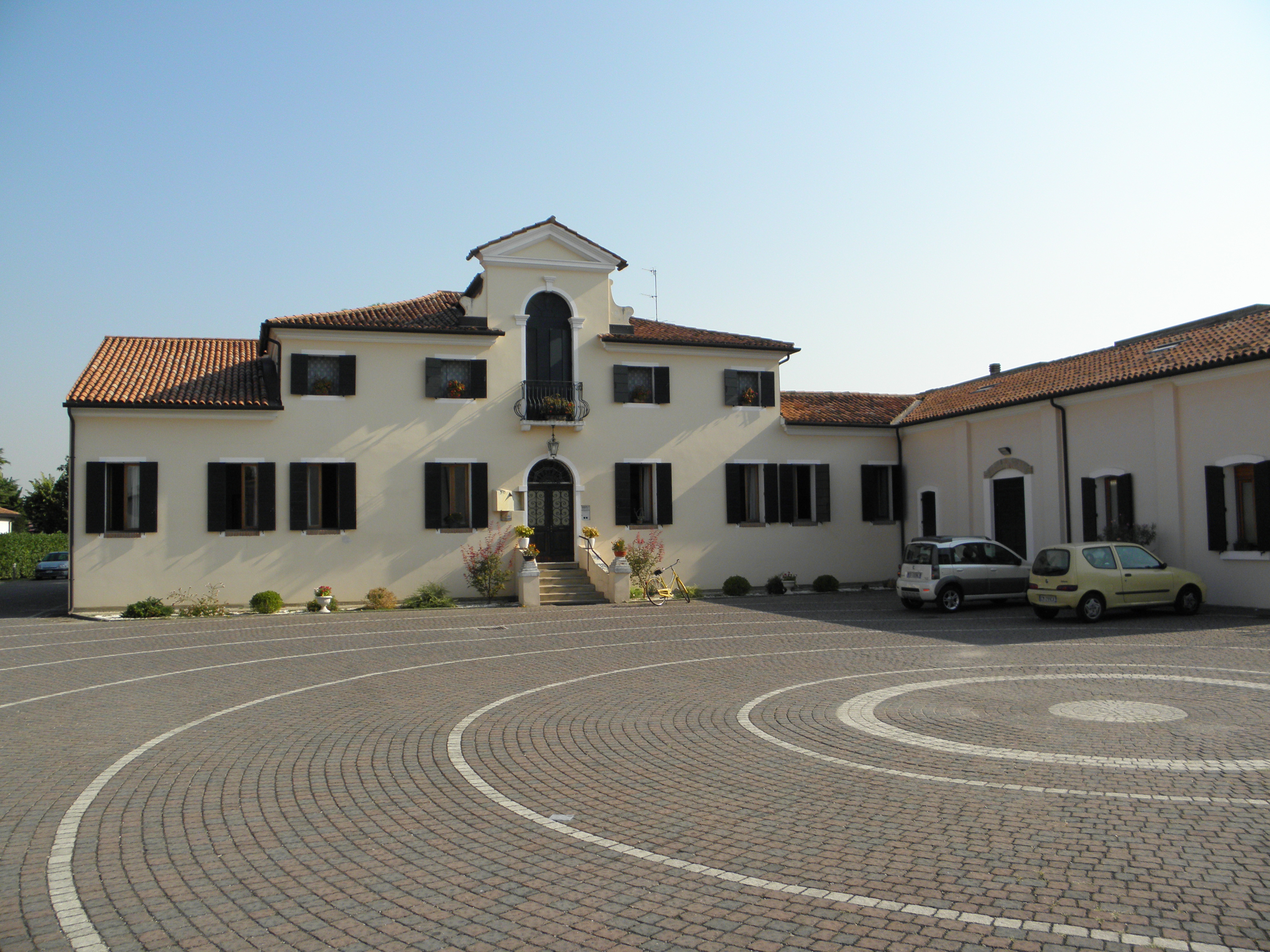 Campagna Lupia: la Casa canonica della Parrocchia di Campagna Lupia sita a destra della chiesa parrocchiale di San Pietro.